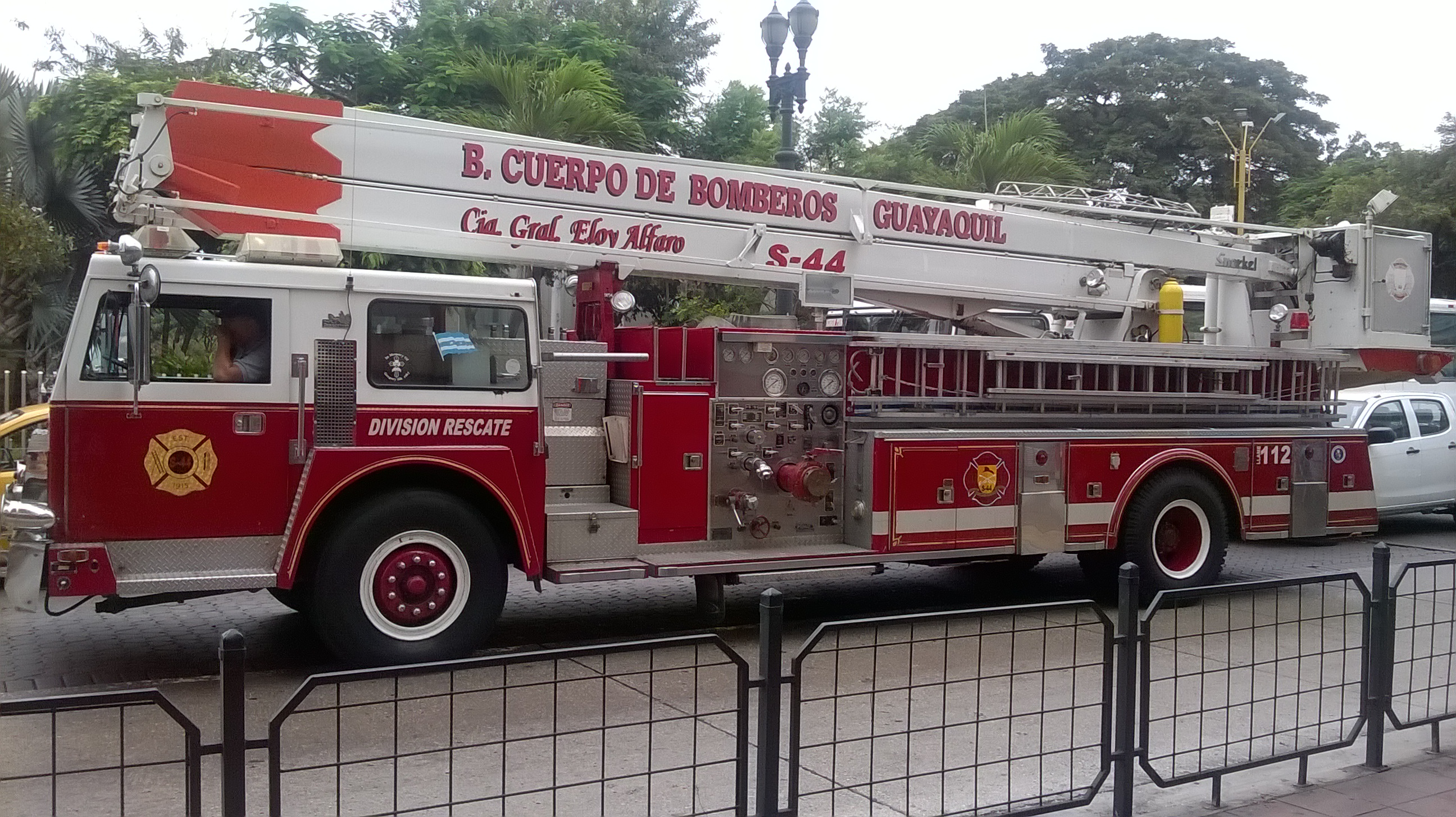 Coche bomba del Benemérito Cuerpo de Bomberos de Guayaquil